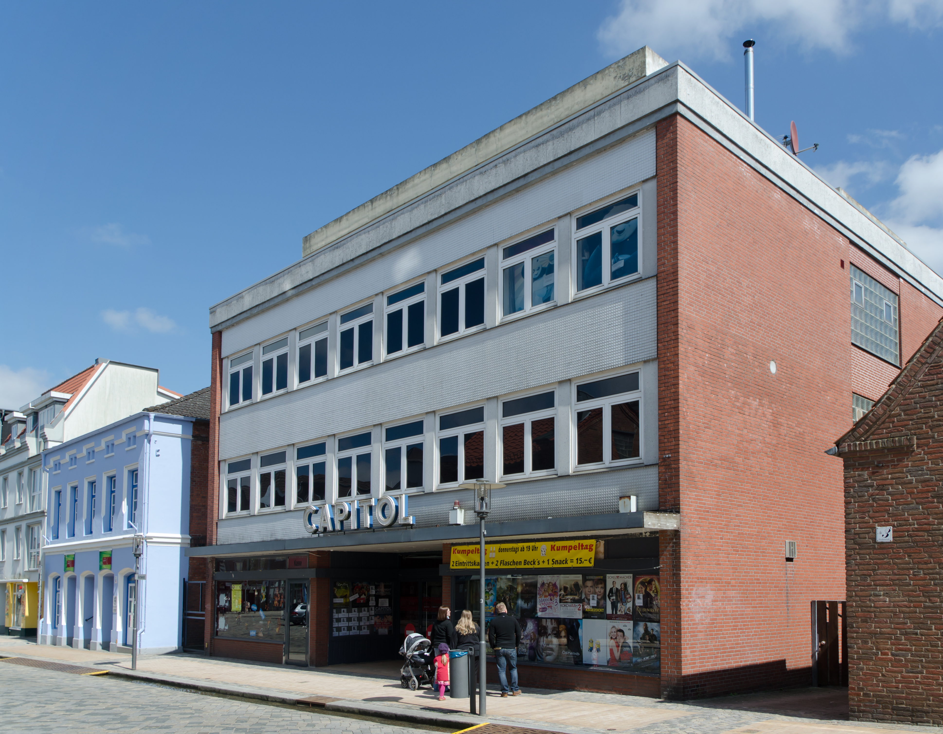 Preetz Kino Capitol